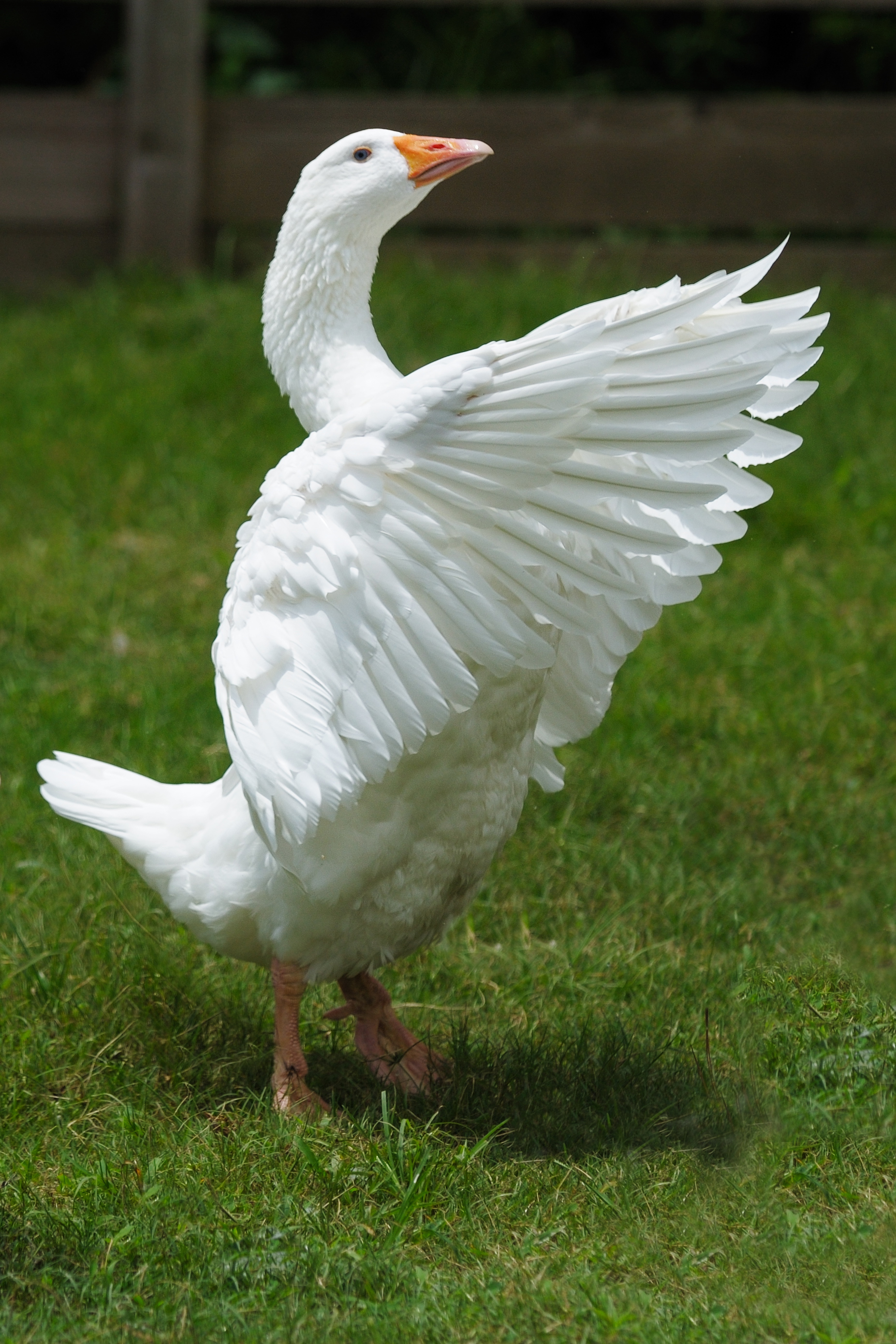 An Embden goose.